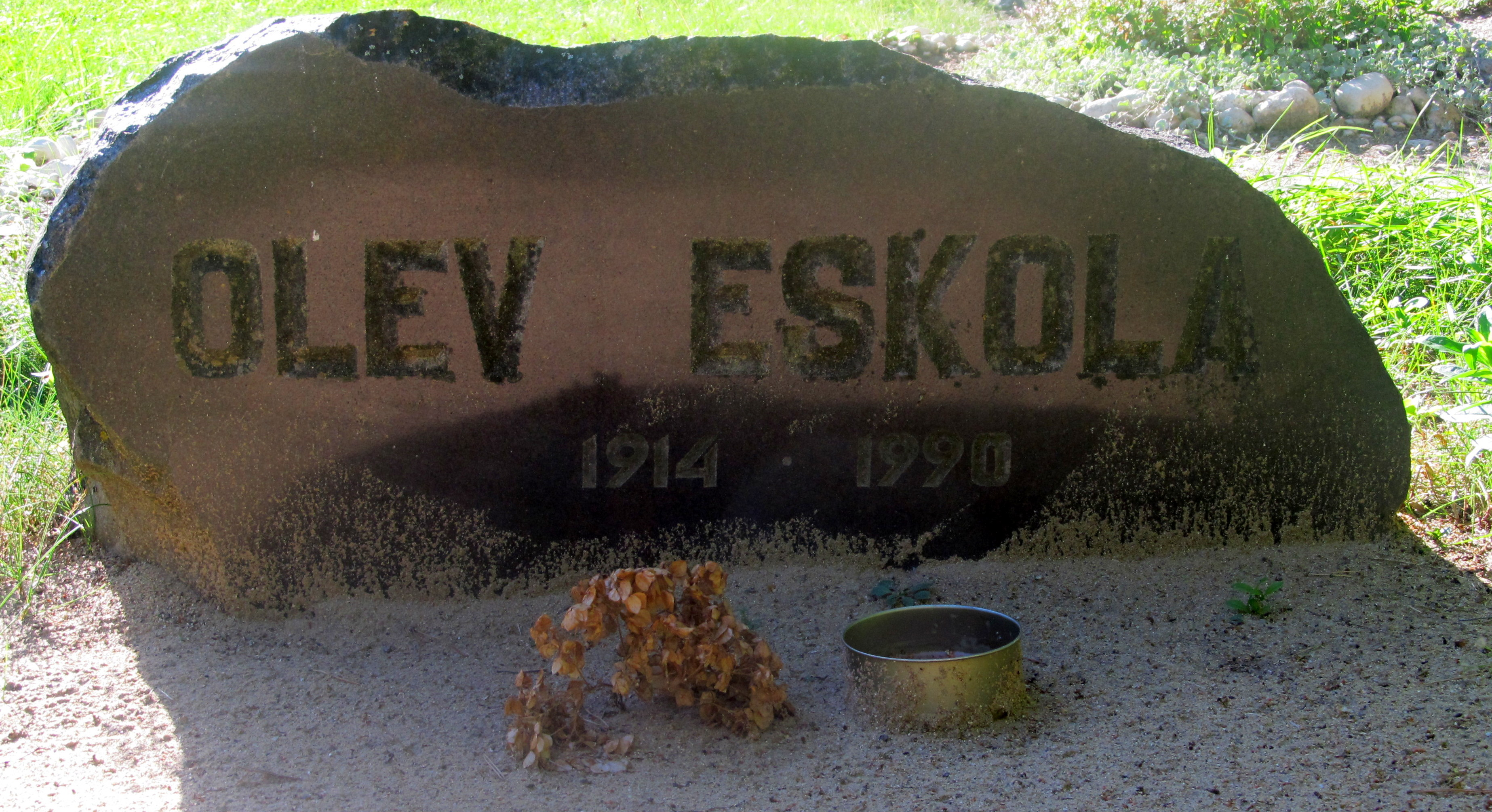 Kassari kabeliaed, Olev Eskola haud